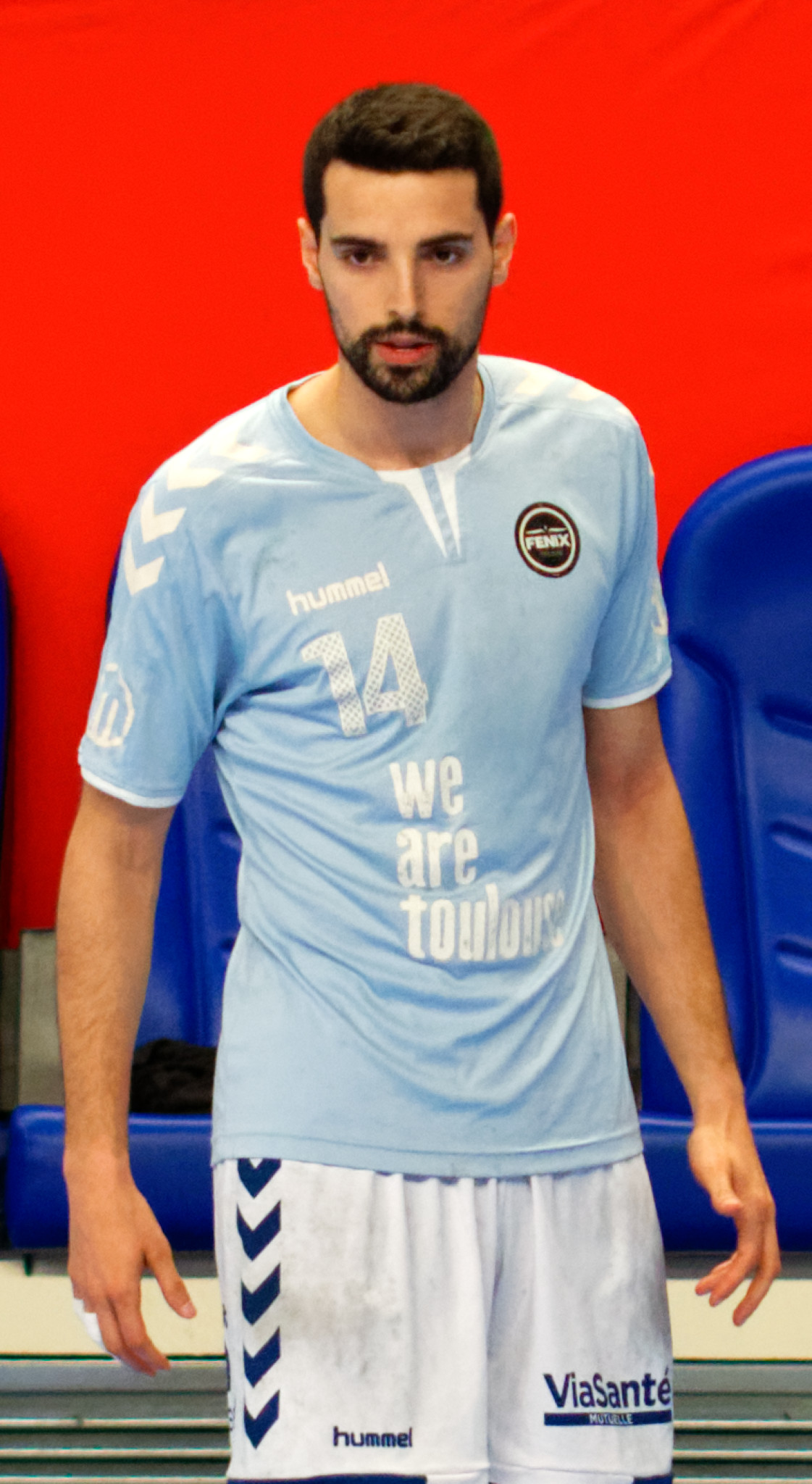 Rencontre de championnat de LidlStarLigue entre le PSG et Toulouse. A Coubertin, le 29 mars 2017.